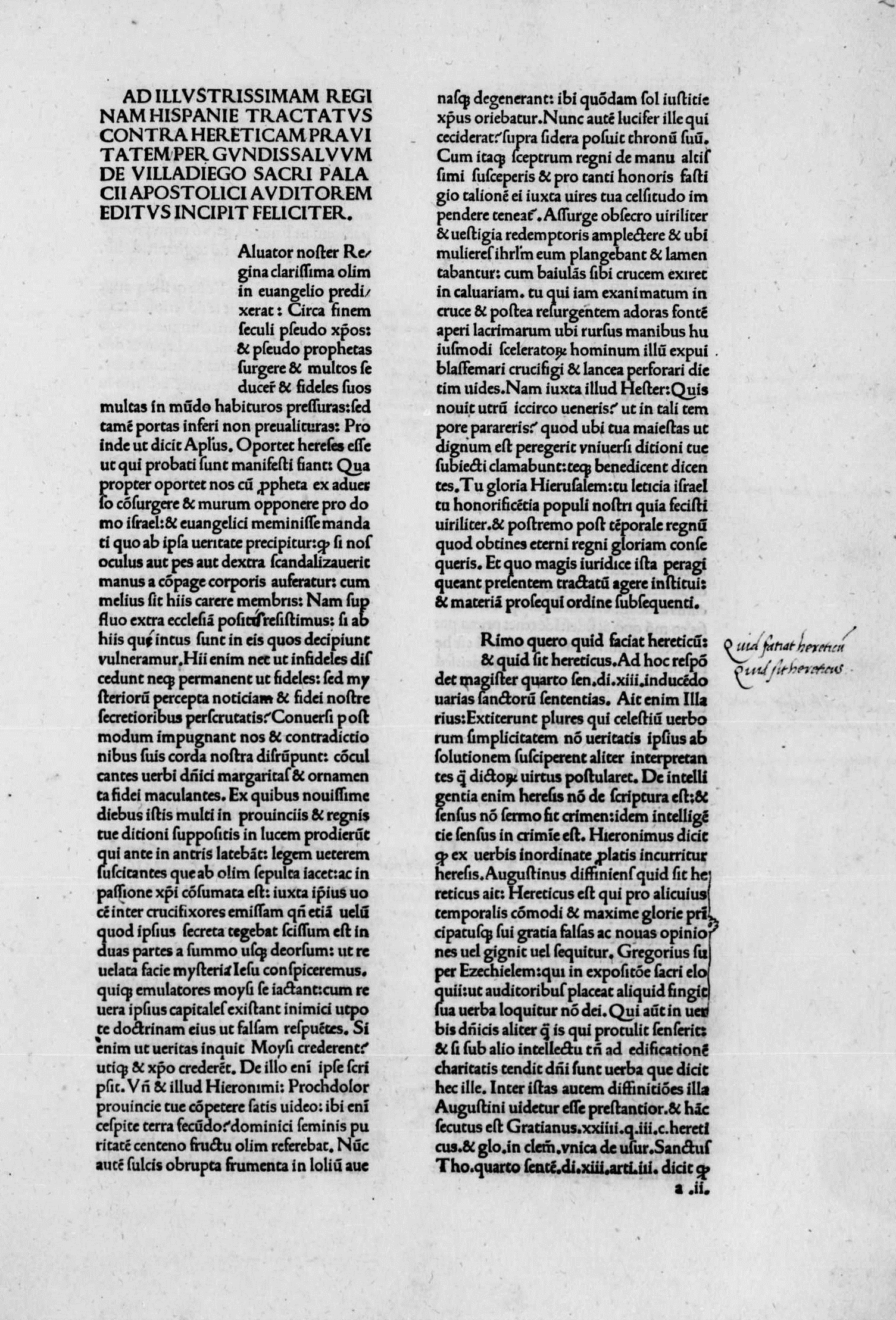 carta a2r